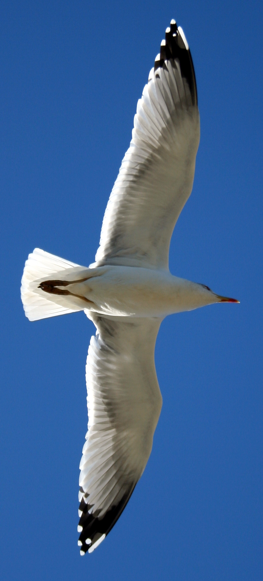 Gaviota volando.